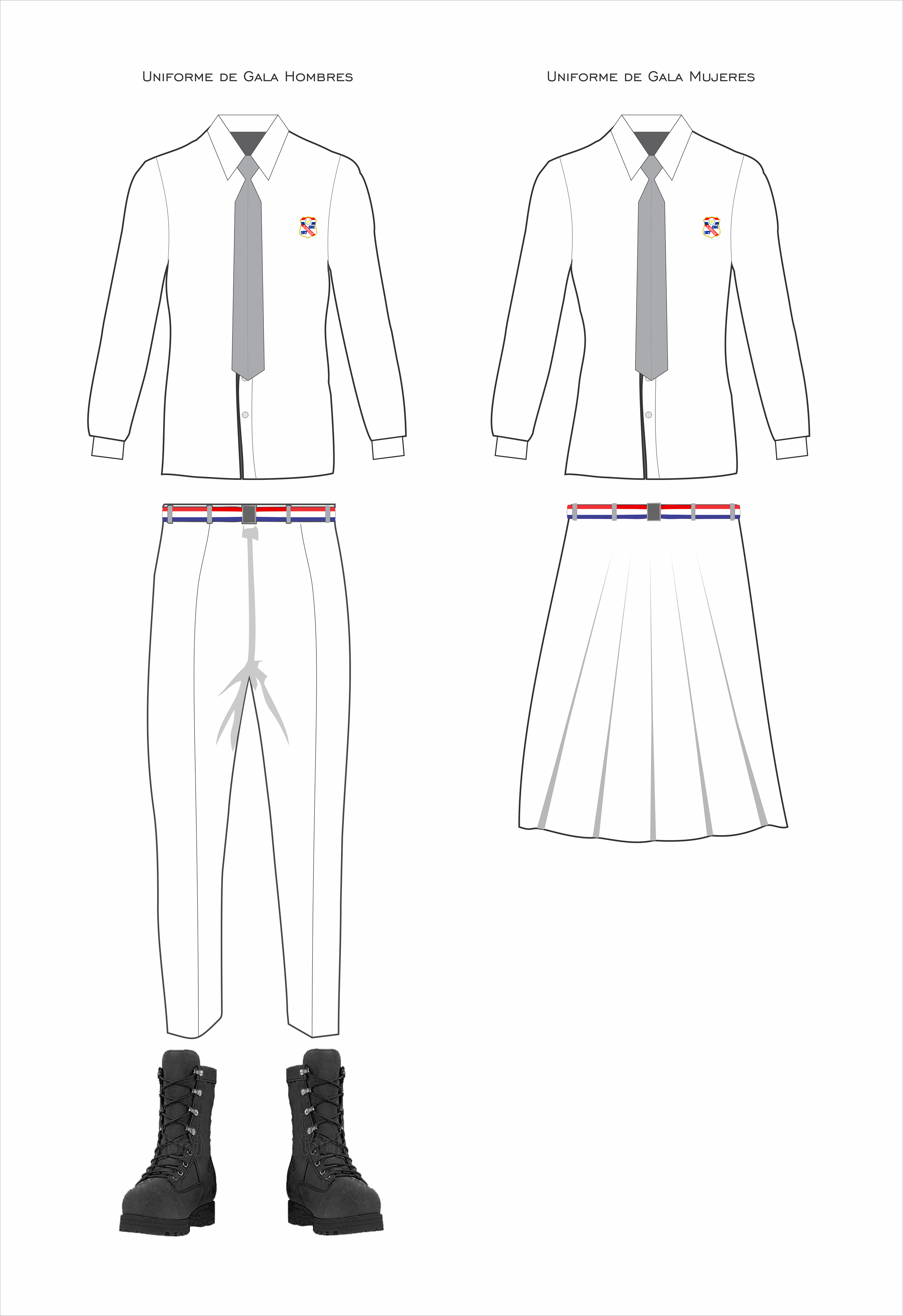 Uniforme de Gala de los alumnos del Colegio Nacional de la Capital "Gral. Bernardino Caballero"